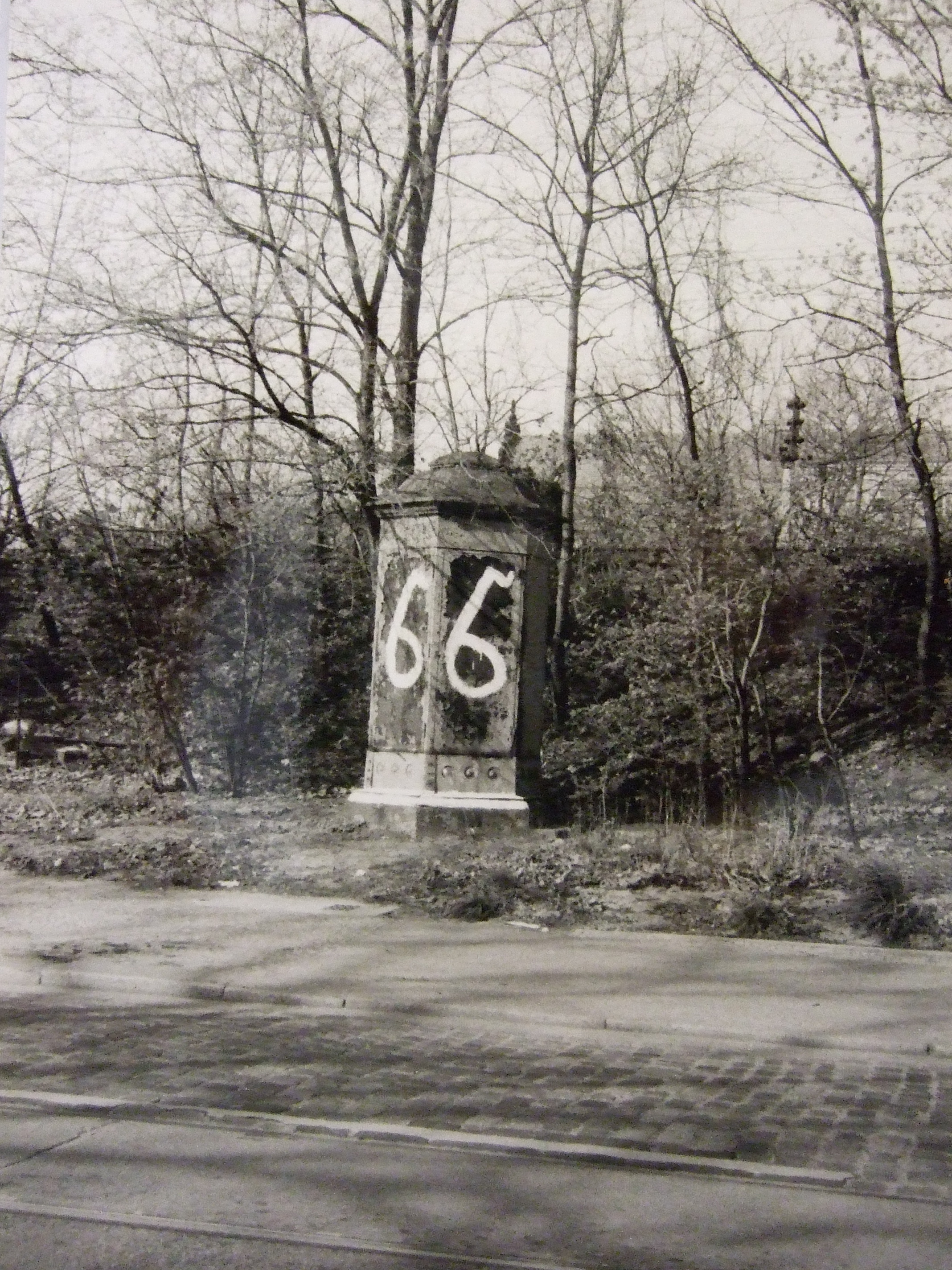 Original Standort, Berlin